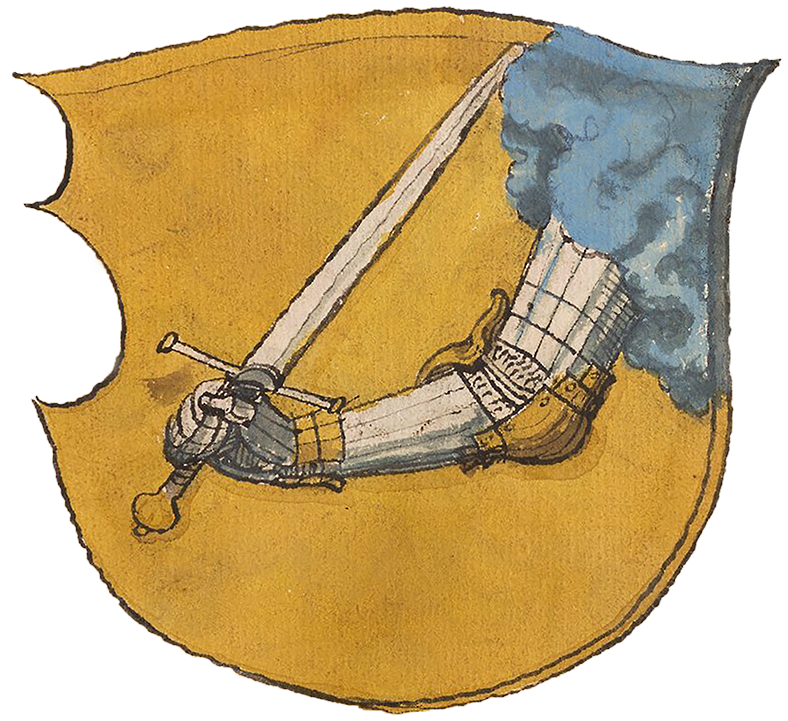 Герб «Малая» или «Польская Погоня».